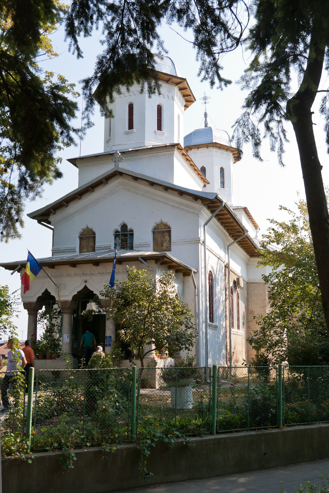 Fotografia prezinta biserica "Sf. Mina", vazuta dinspre V. 01